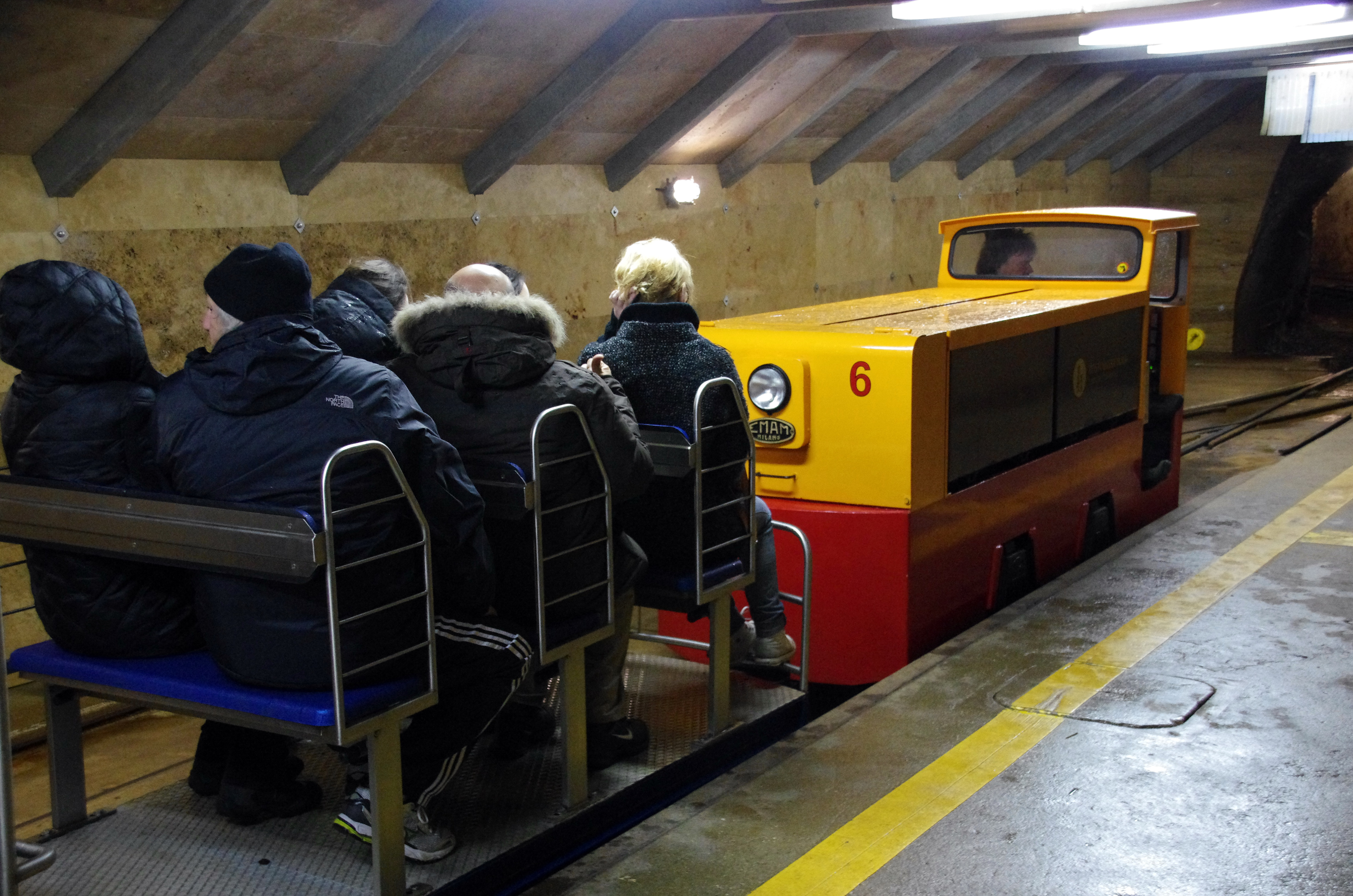 1.4.13 1 Postojna Cave 60